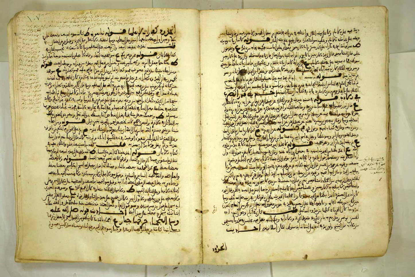 تصنيف:كتب الحديث تصنيف:كتب أهل السنة والجماعة تصنيف:أغلفة كتب